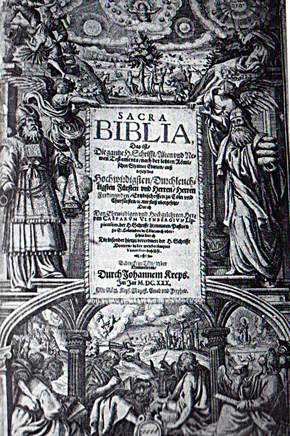 Bibel Übersetzung von Caspar Ulenberg, gedruckt 1630 von Johannes Kreps in Köln